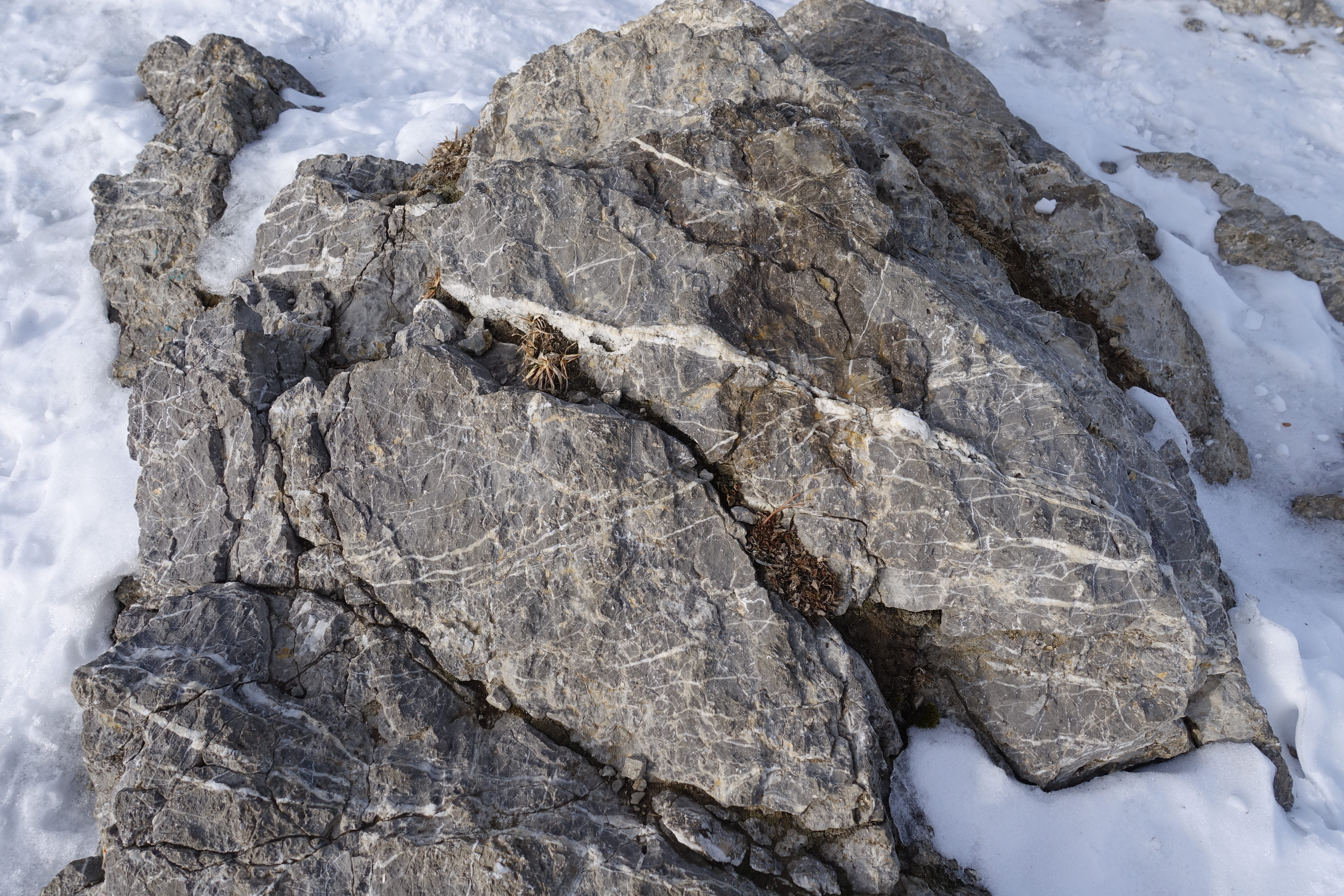 Gutenstein-Formation, Kasberg Gipfel, Oberösterreichische Voralpen, Österreich